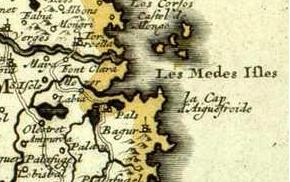 Mapa del Principat de Catalunya de l'any 1696 publicat a Ámsterdam per Cornelis Danckerts